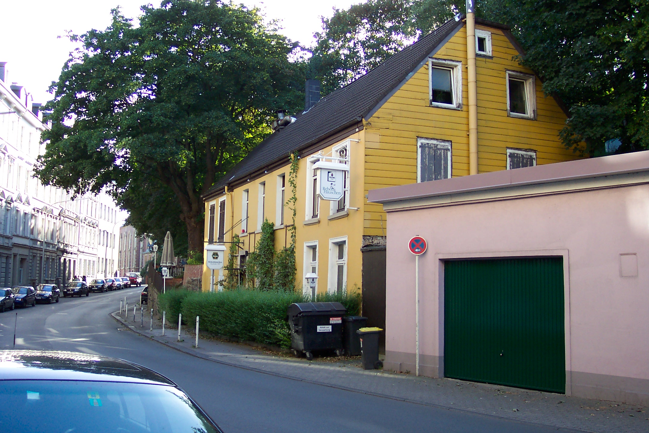 Nützenberger Straße, Wuppertal